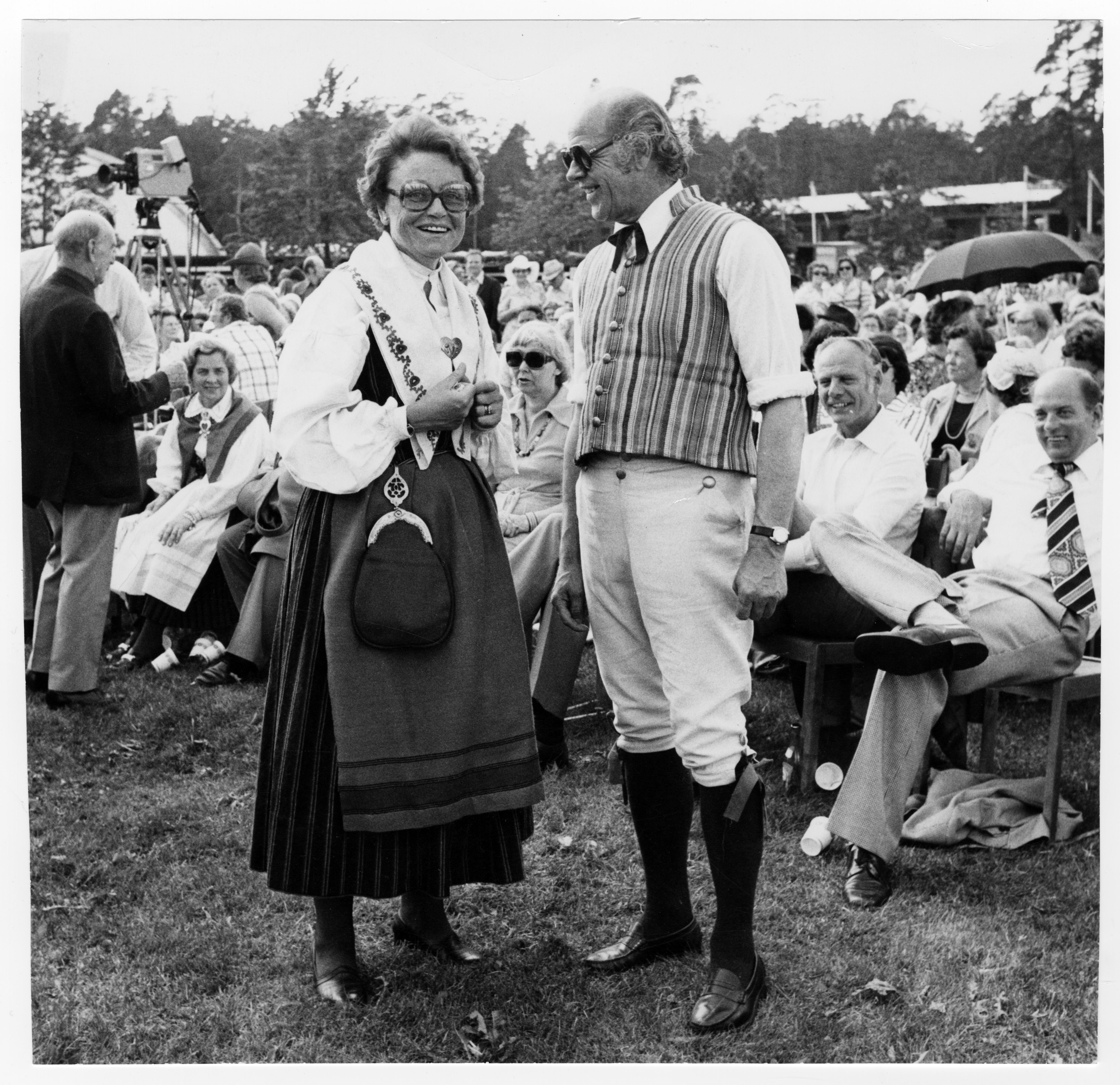 Karin Söder och Rune Gustavsson, under "Landsbygd 1968".